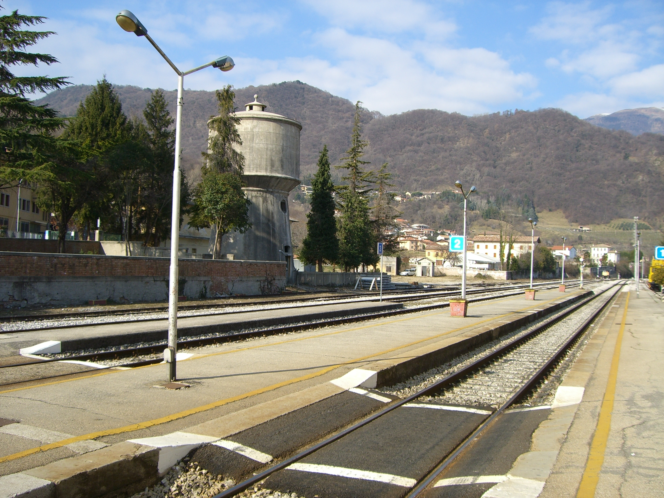 Binari e serbatoio dell'acqua della stazione di Vittorio Veneto